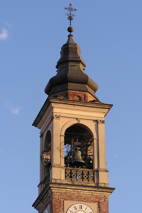 Il campanile della Basilica di Cuggiono (MI)